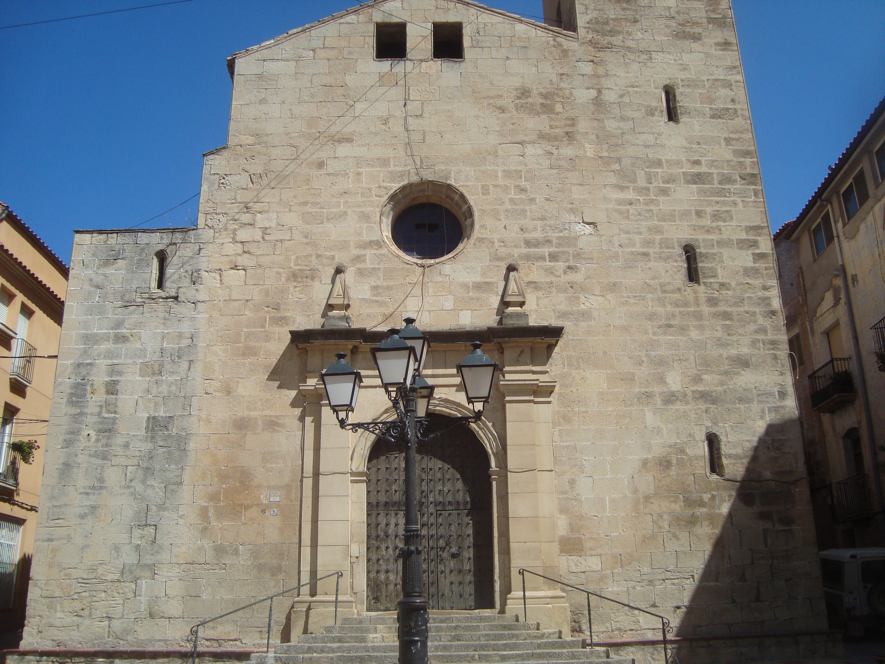 Església de Santa Maria de l'Assumpció (Benifallet)